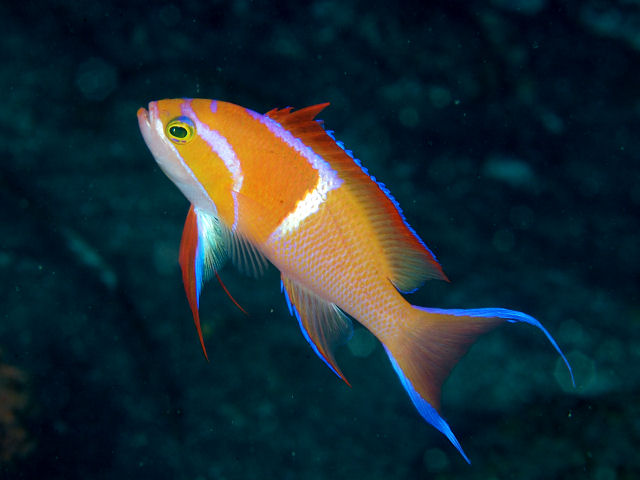 シロオビハナダイ♂ Pseudanthias leucozonus